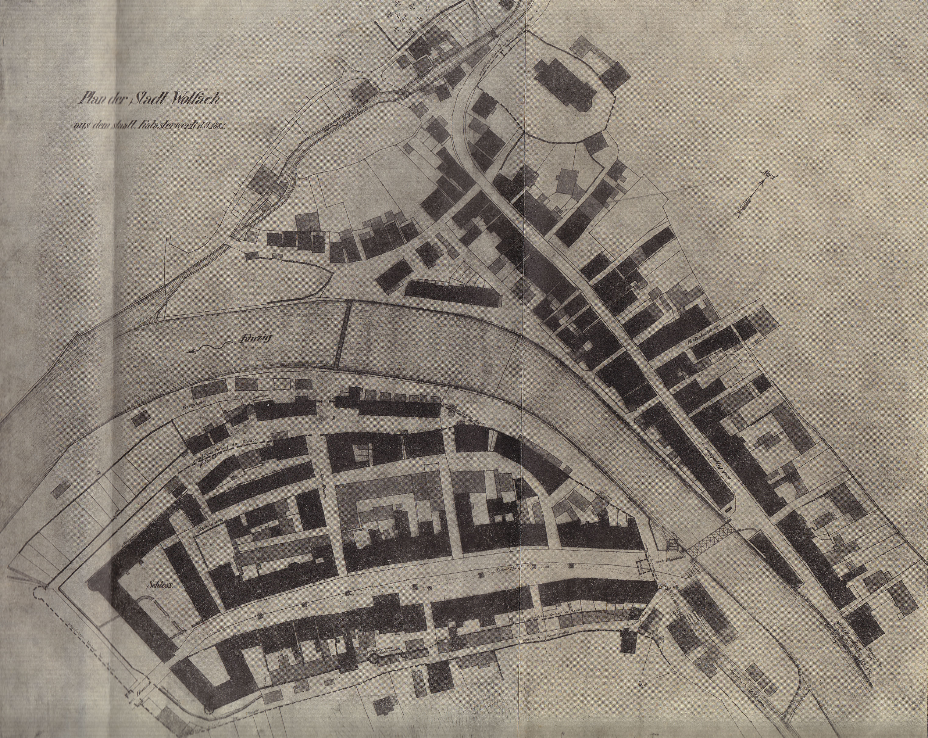 Plan der Stadt Wolfach im Kinzigtal. Aus dem amtlichen Katasterwerk von 1881.